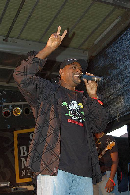 Lt. Stitchie & Band